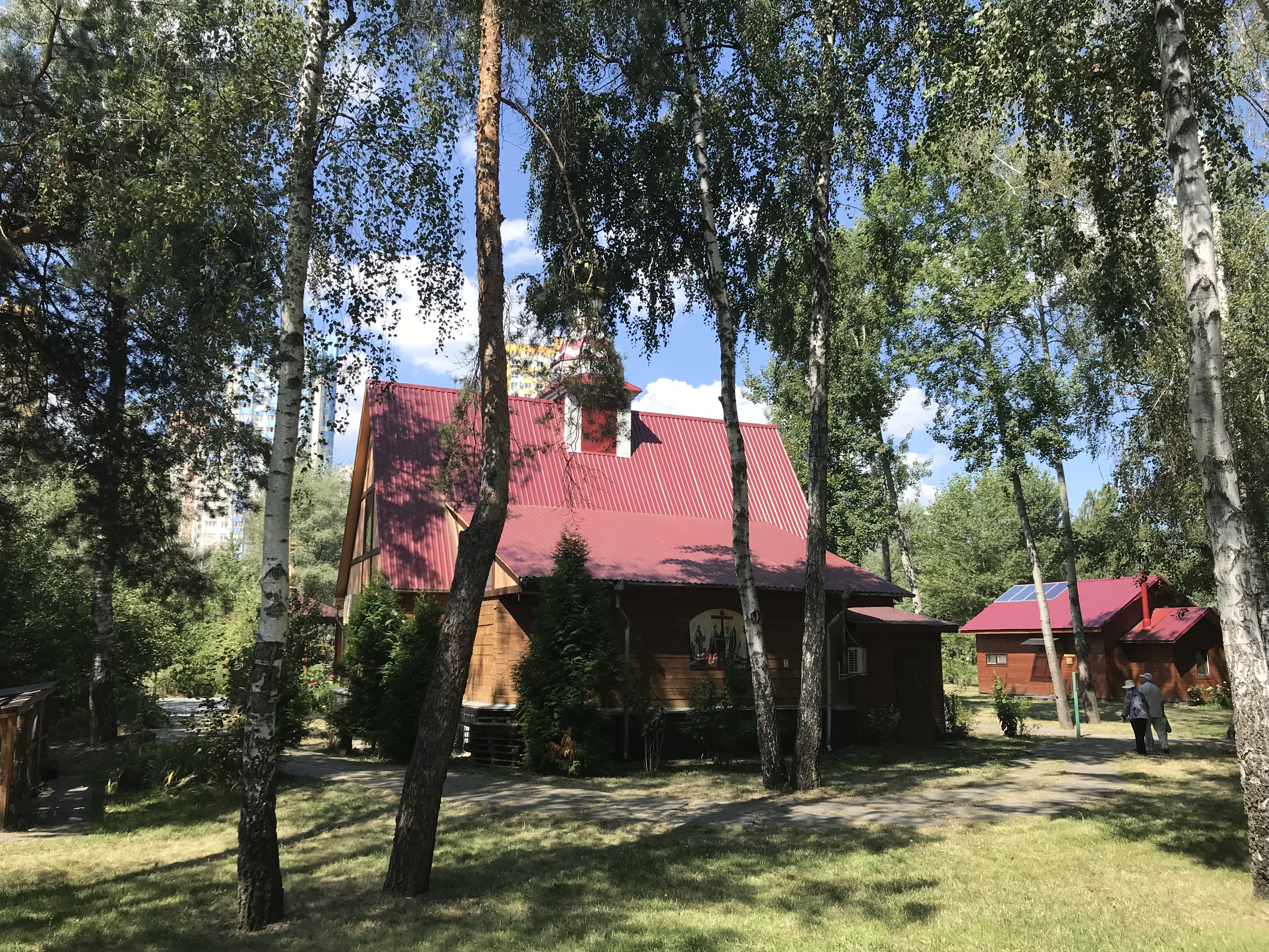 Общий вид на Храм всех святых воинов УПЦ в парке «Победа» в Киеве